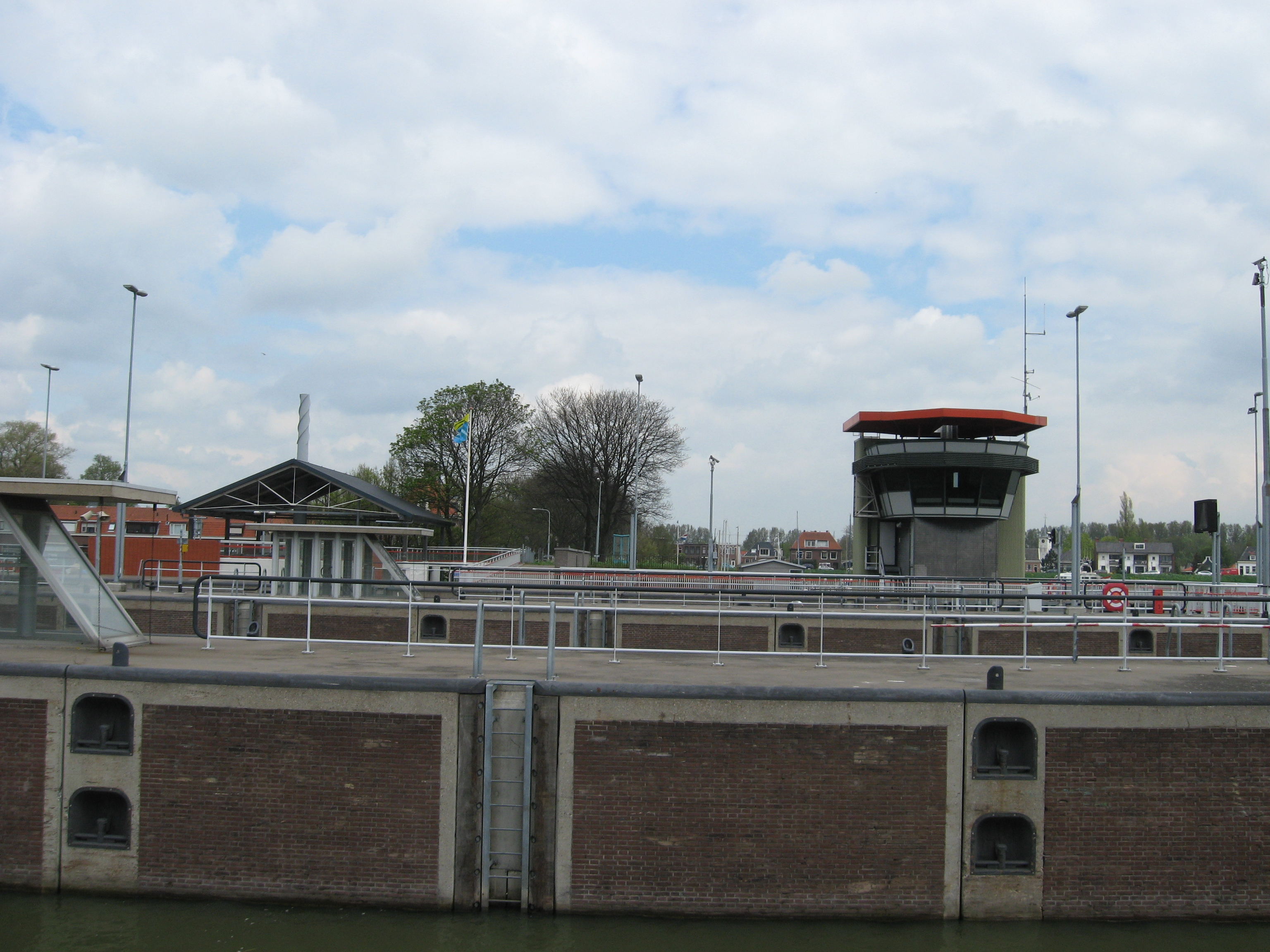 Oranjesluizen